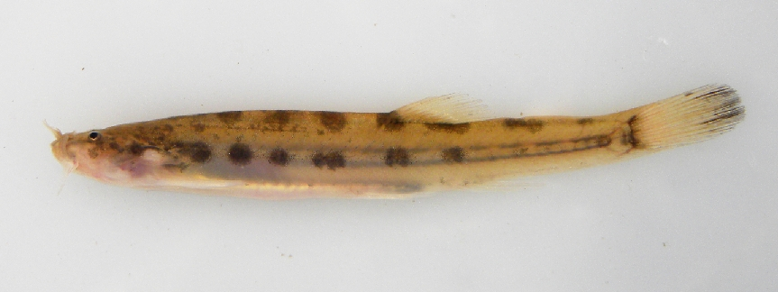 Scleronema macanuda - Quebrada de los Cuervos, Dpto. de Treinta y Tres, Uruguay - 3/III/2015